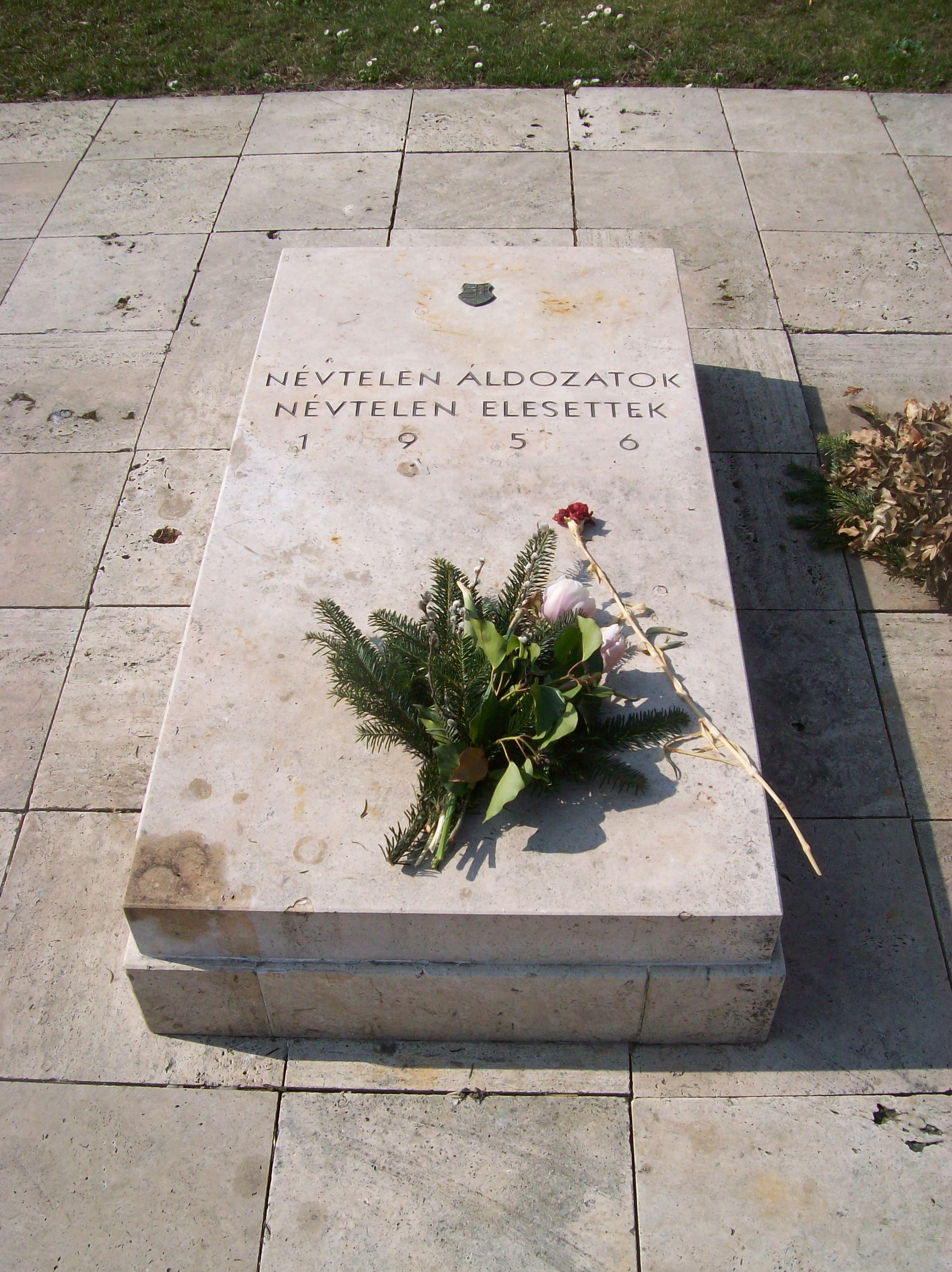 A névtelen áldozatok síremléke a 301-es parcellában